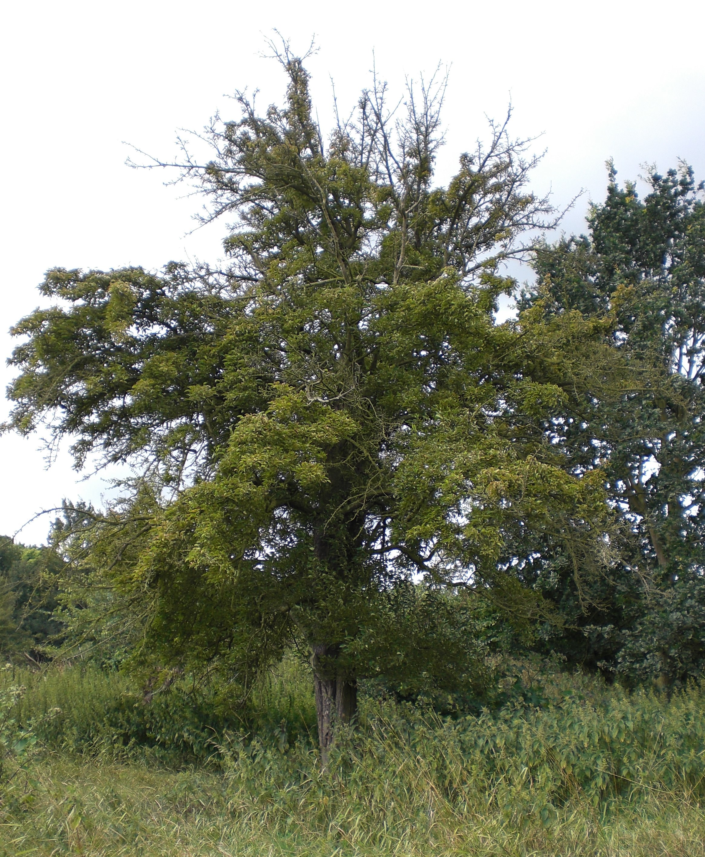 Birnbaum (Pyrus sp.) auf dem Gelände des ehemaligen Guts Kulenhagen in der Kreuzhorst bei Magdeburg